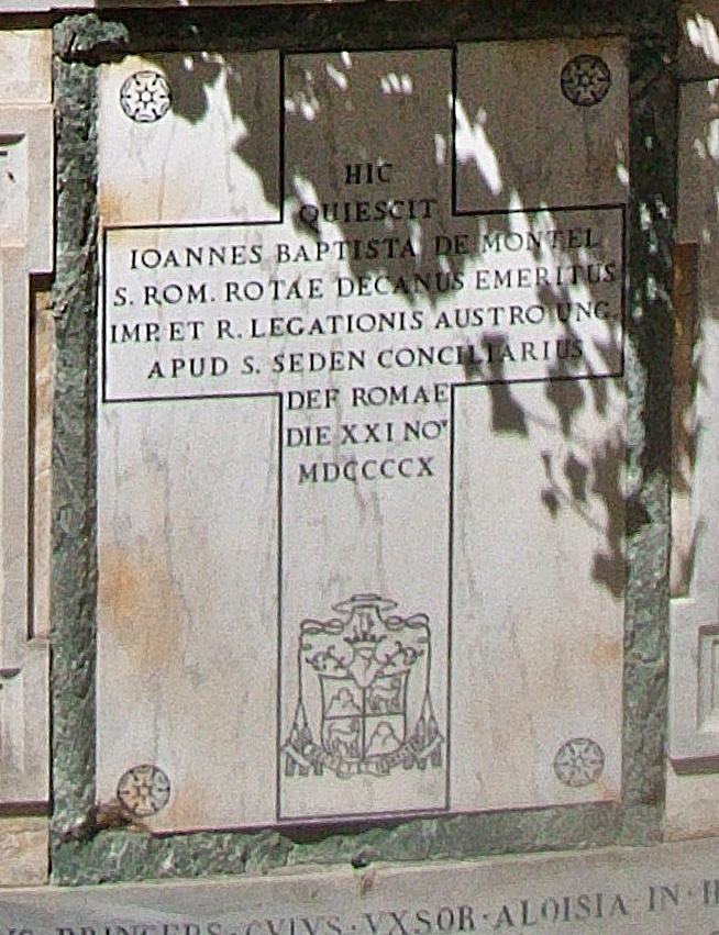 Rom, Campo Santo Teutonico, Epitaph des österreichischen Priesters und Diplomaten Johannes Montel (1831-1910)